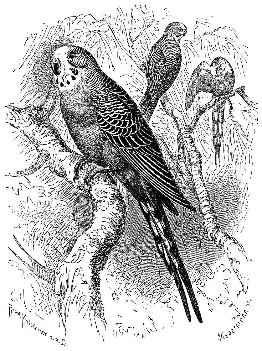 Brehms Tierleben, 2. Aufl., 1882-1887, Bd. 2, S. 177, Wellensittich